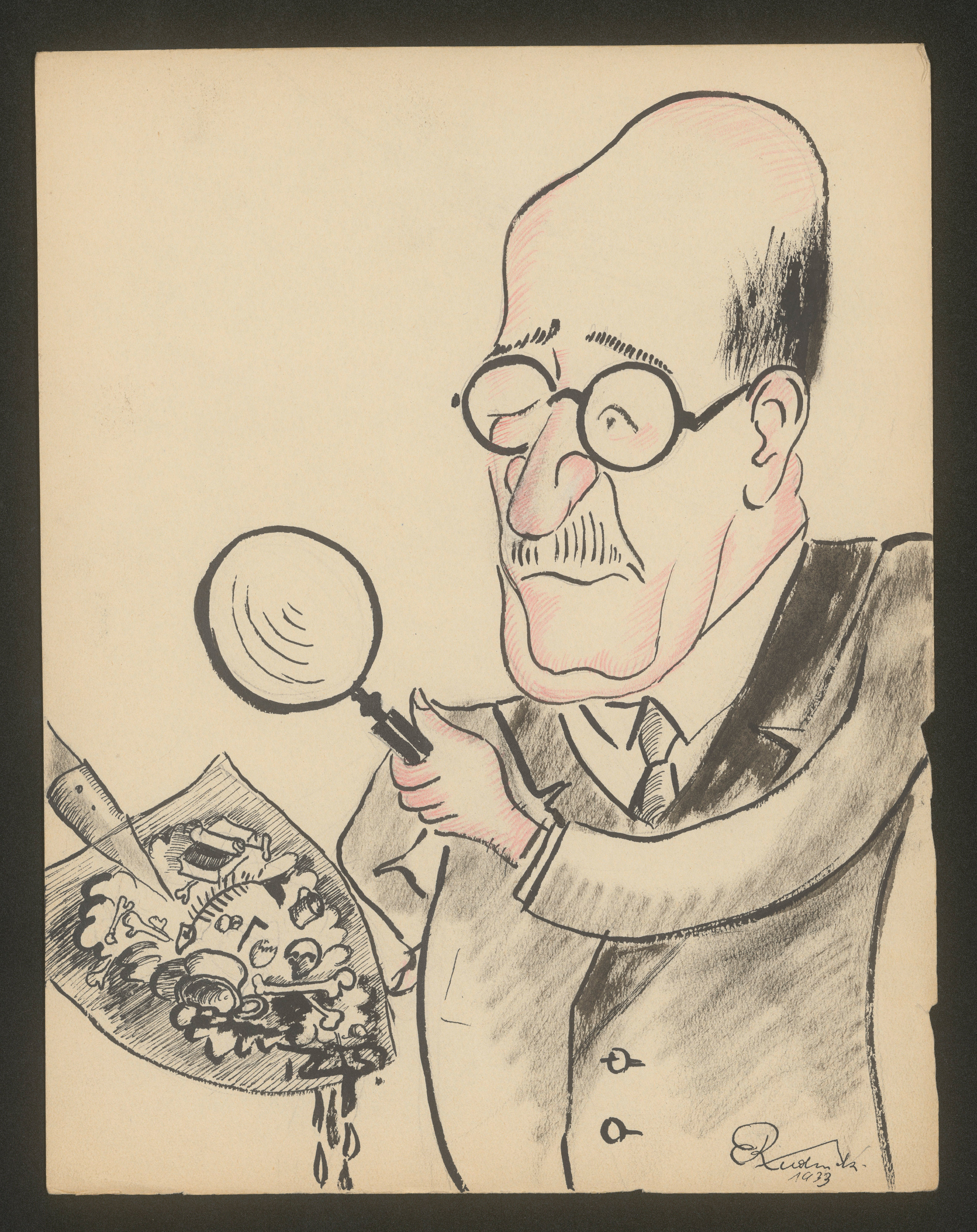 Władysław Semkowicz - karykatura